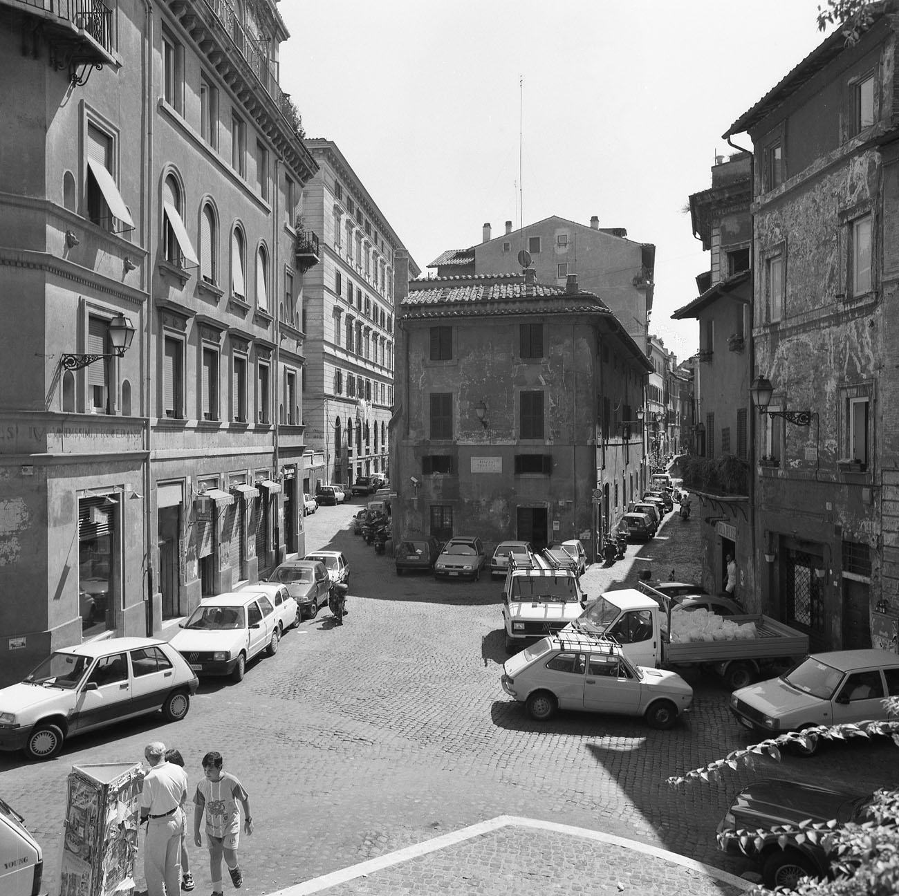 Piazza Trilussa